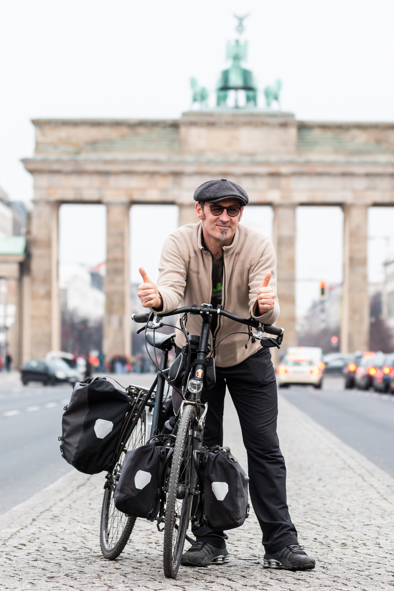 Sven Marx mit seinem Reiserad vor dem Brandenburger Tor in Berlin